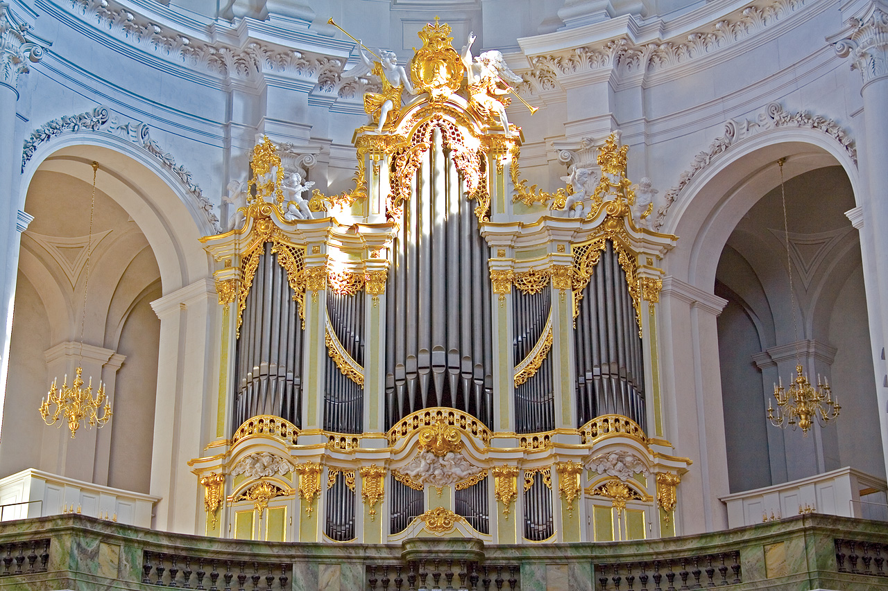 Blick auf die Silbermann-Orgel in der Hofkirche Dresden Aufgenommen im Oktober 2006 Fotograf: Timo Sack